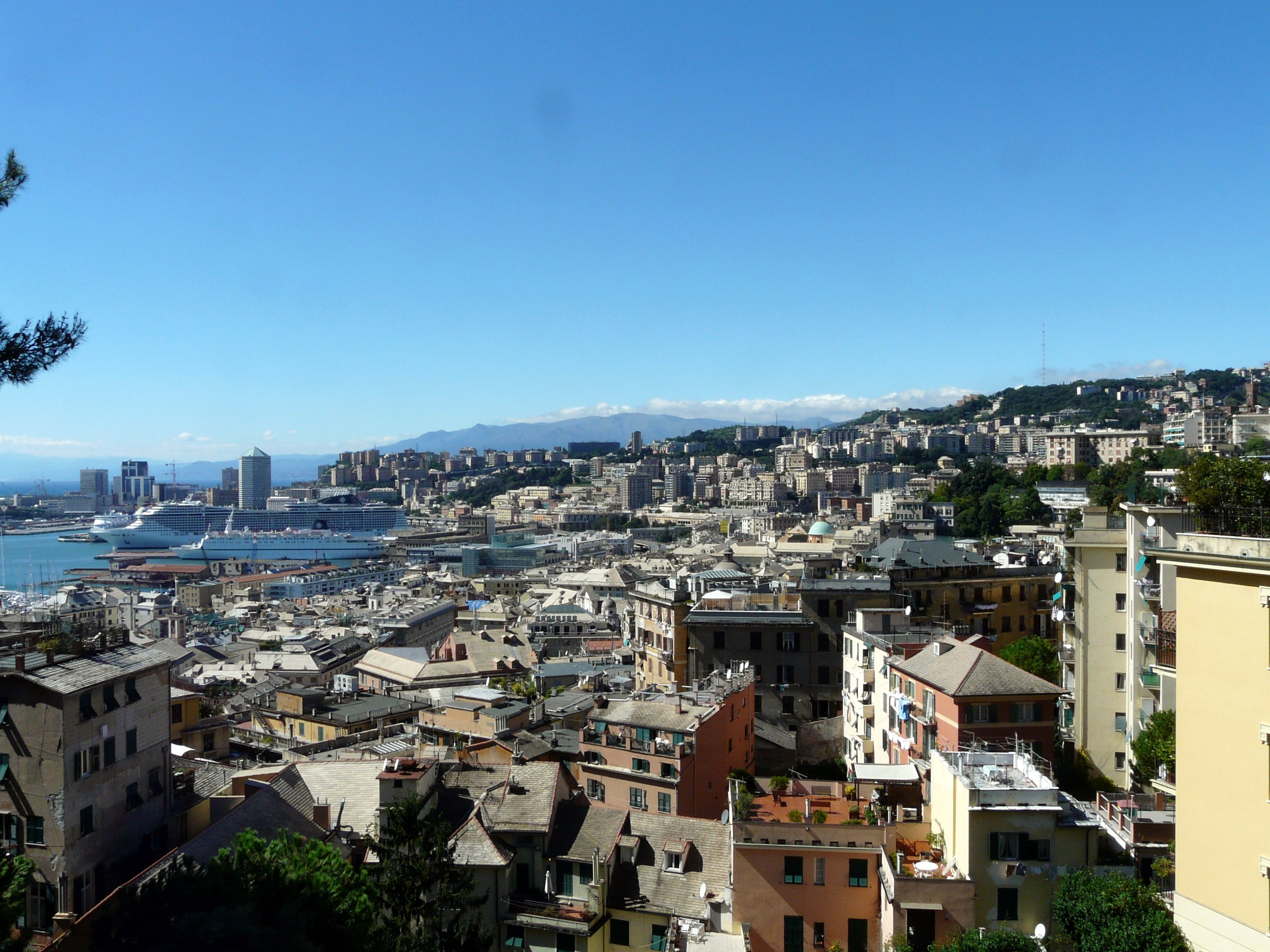 Panorama di Genova, dal porto al centro storico, dal Belvedere Montaldo presso Spianata Castelletto, Castelletto, Genova, Liguria, Italia